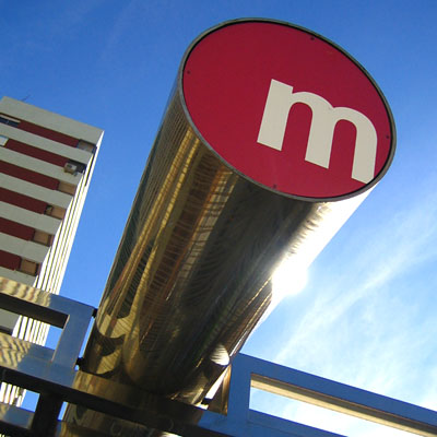 Parada de metro de València amb el seu logo.